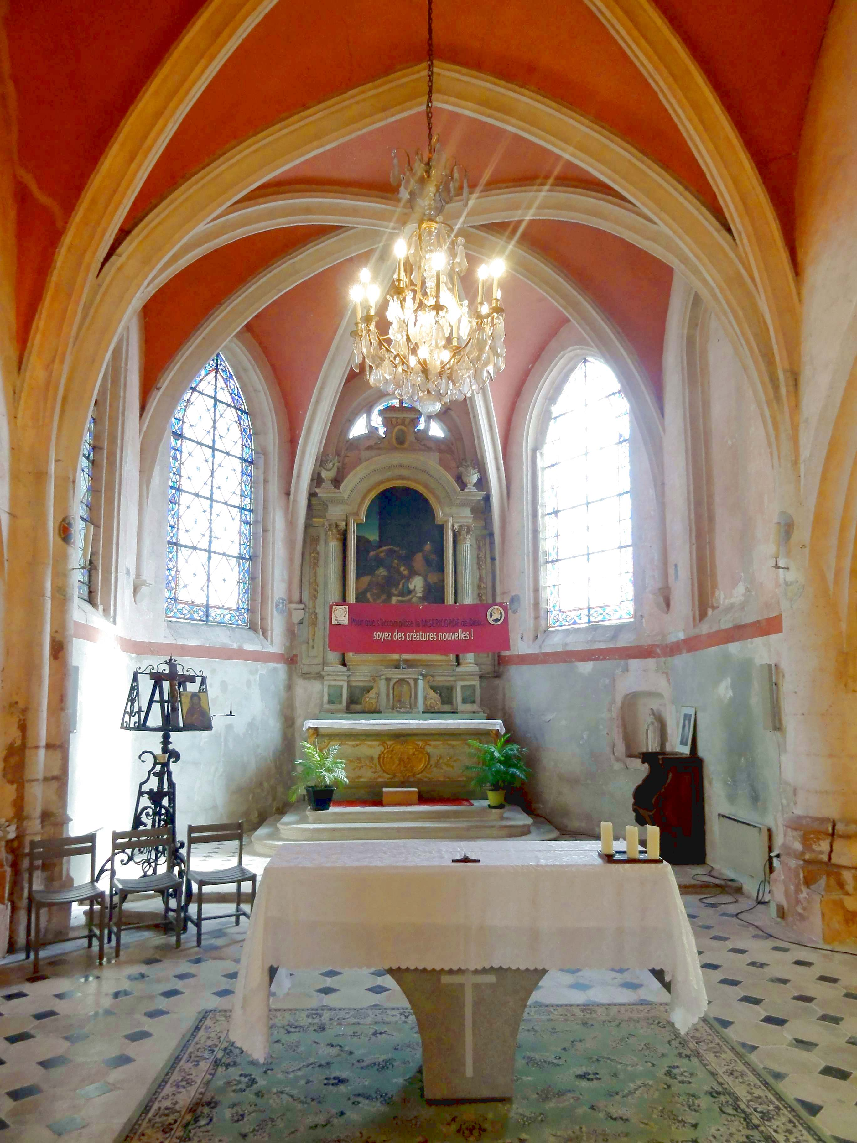 Intérieur de l'église - voir titre.